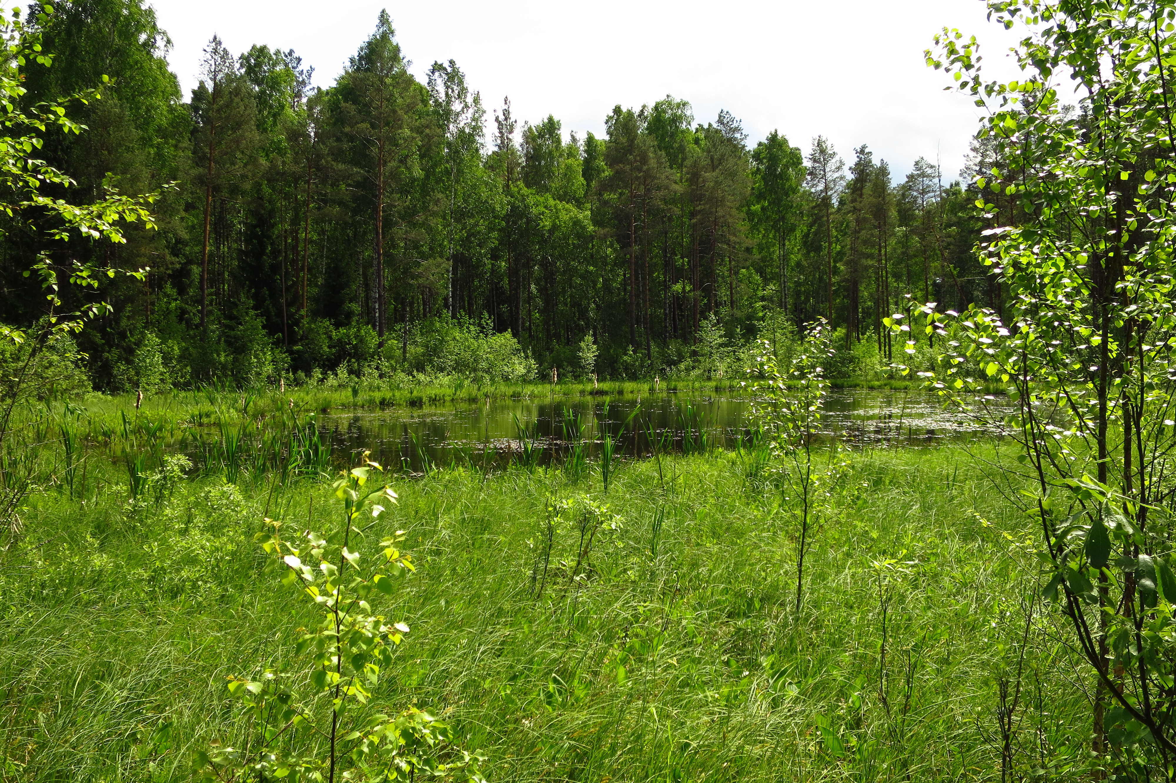 Kurtna Punane järv Kurtna MKA